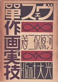 『ヴェス単作画の実技』表紙、河原侃二、光大社、1936年